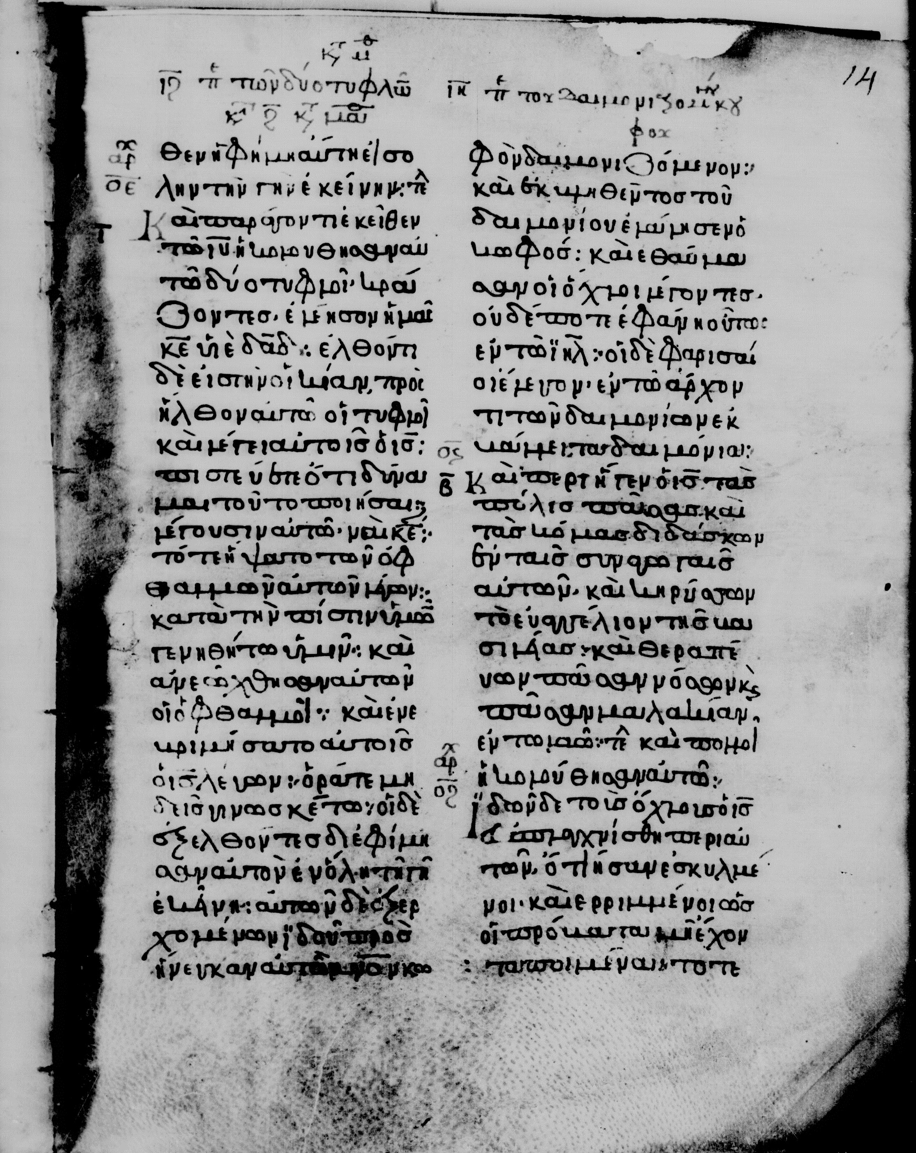 page of the codex